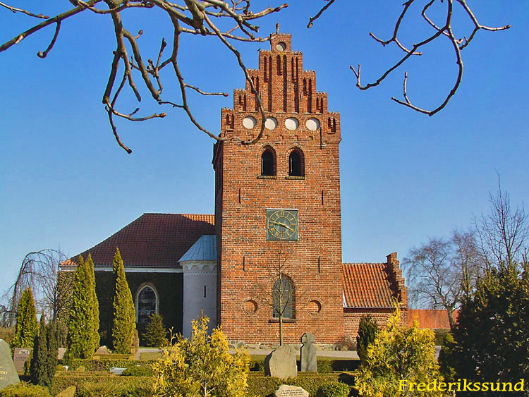 fra vest